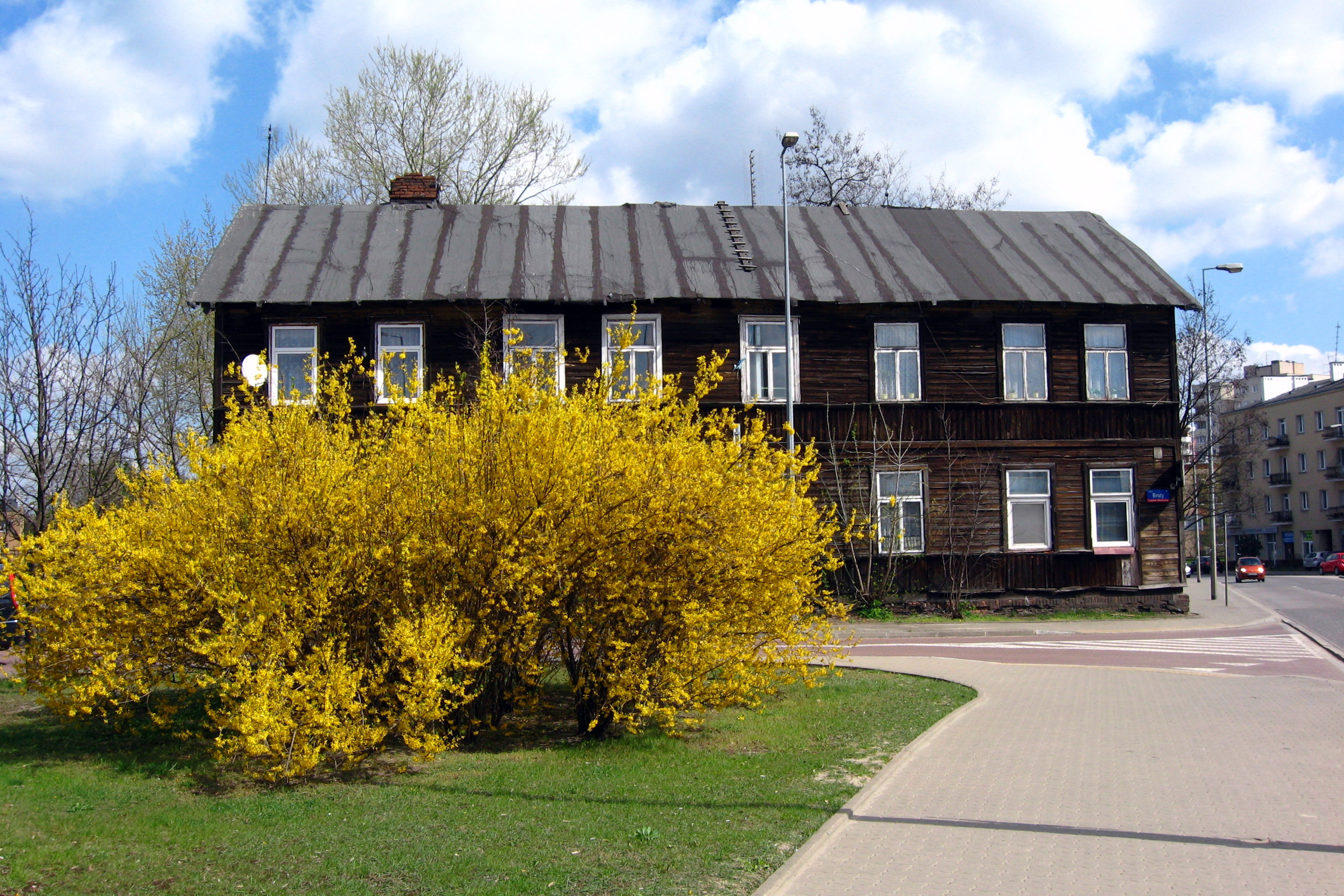 Dom na rogu św. Wincentego i Biruty.